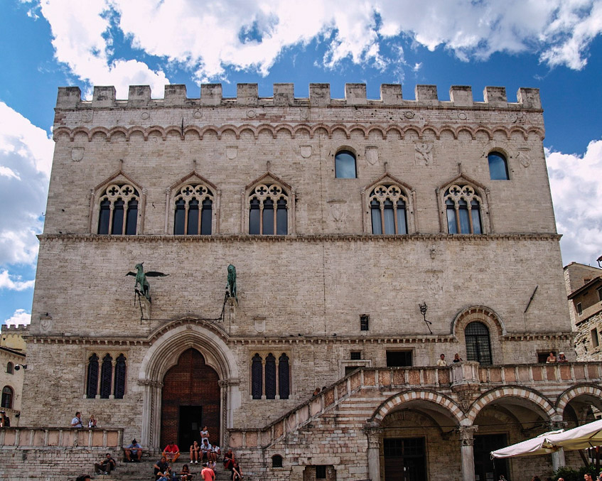 Palazzo dei Priori - Facciata